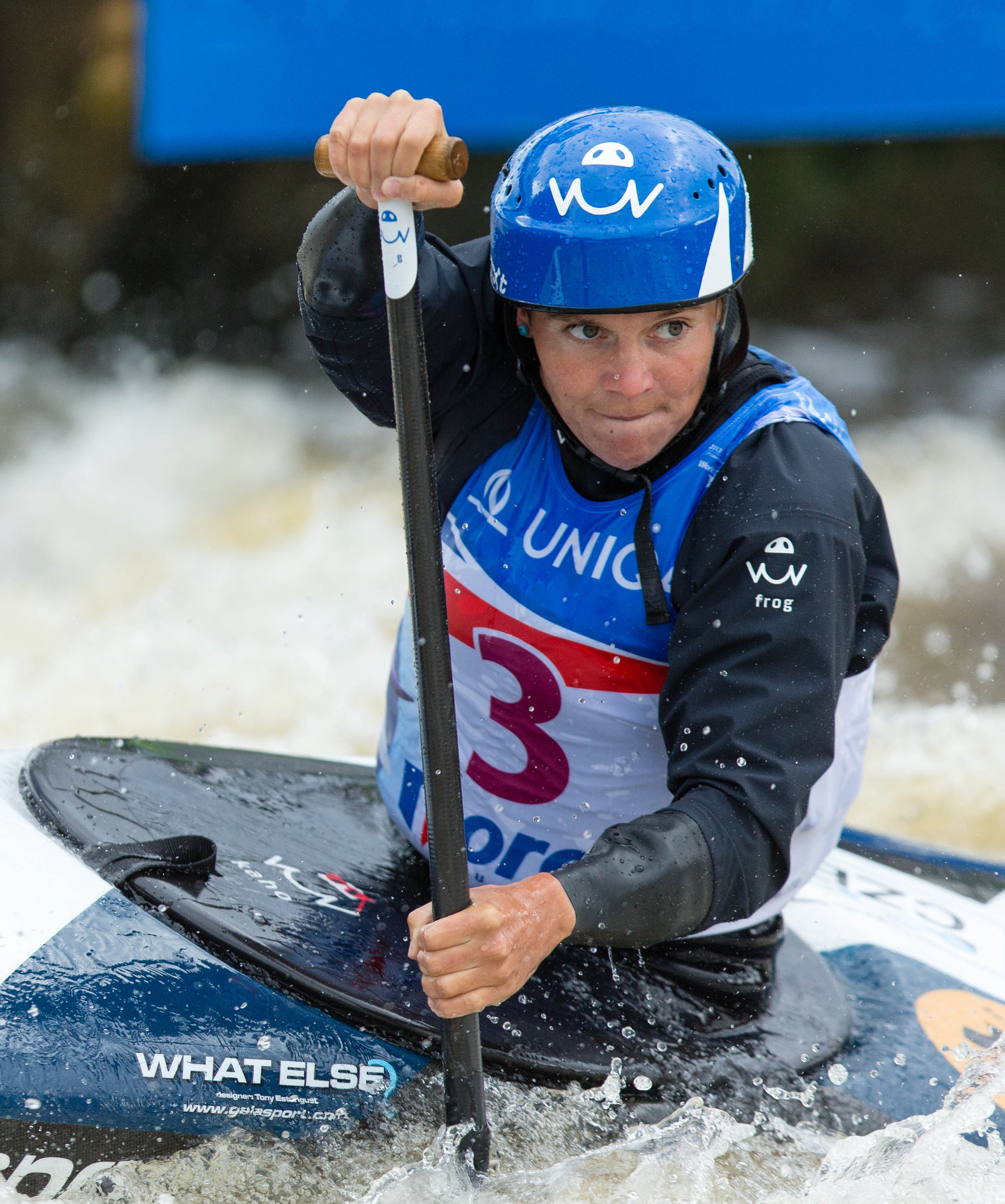 Kateřina Hošková